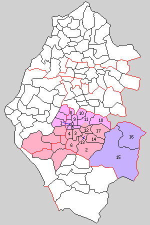 福井県今立郡の町村制時点の町村。